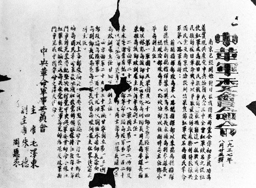 1937年8月25日红军改编为国民革命军第八路军